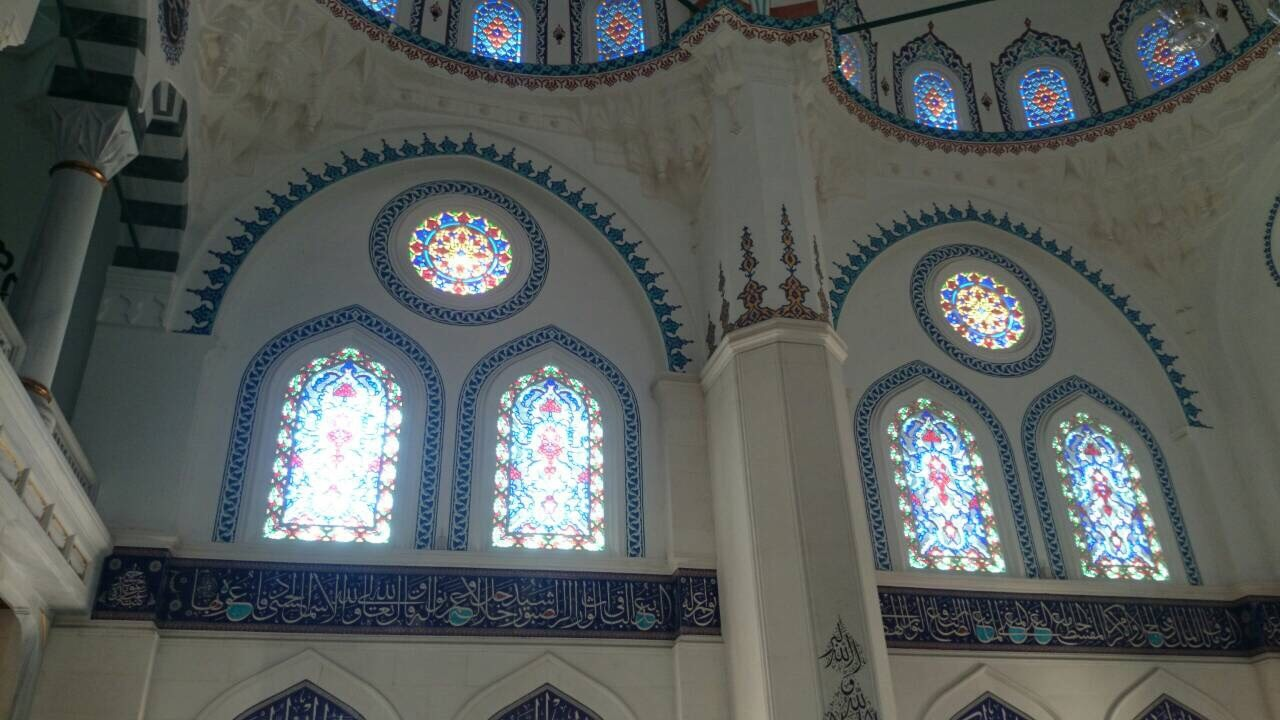 Inside Tokyo Camii, Tōkyō-jāmii, Tokyo Mosque (東京ジャーミイの中) Thanks to Y's lens